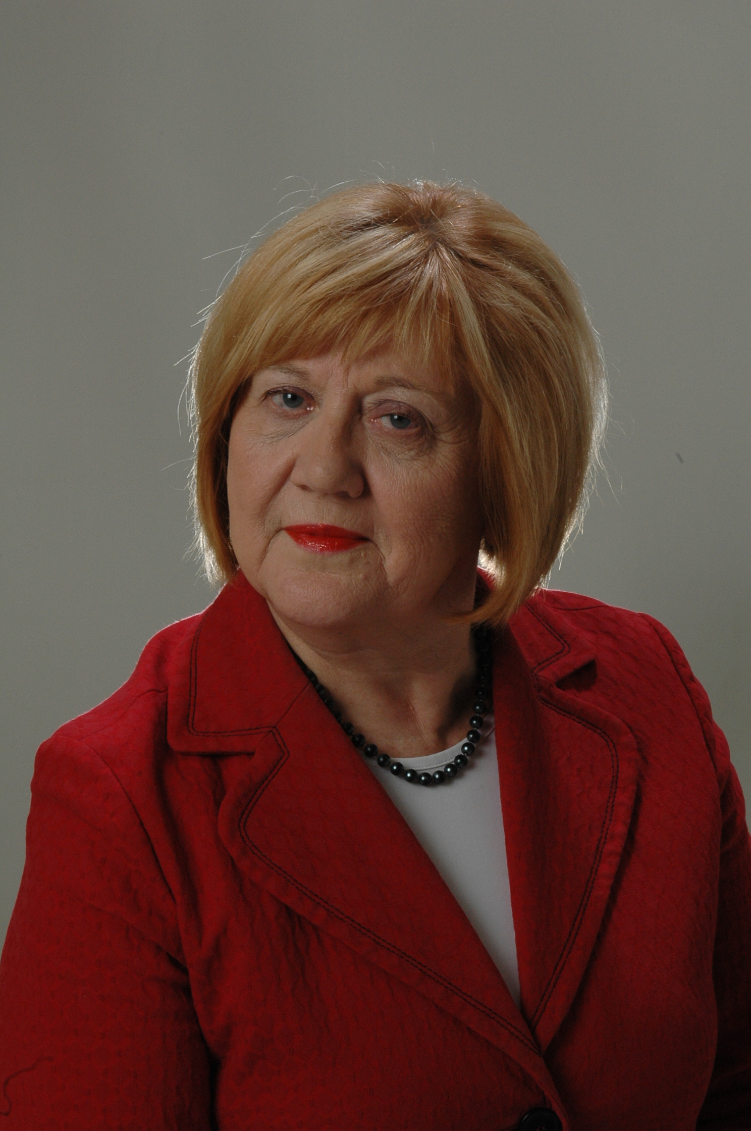 Foto: Saeima